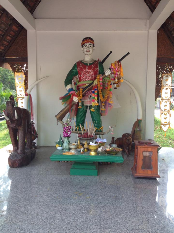 อนุสาวรีย์เจ้าหนานทิพย์ช้าง